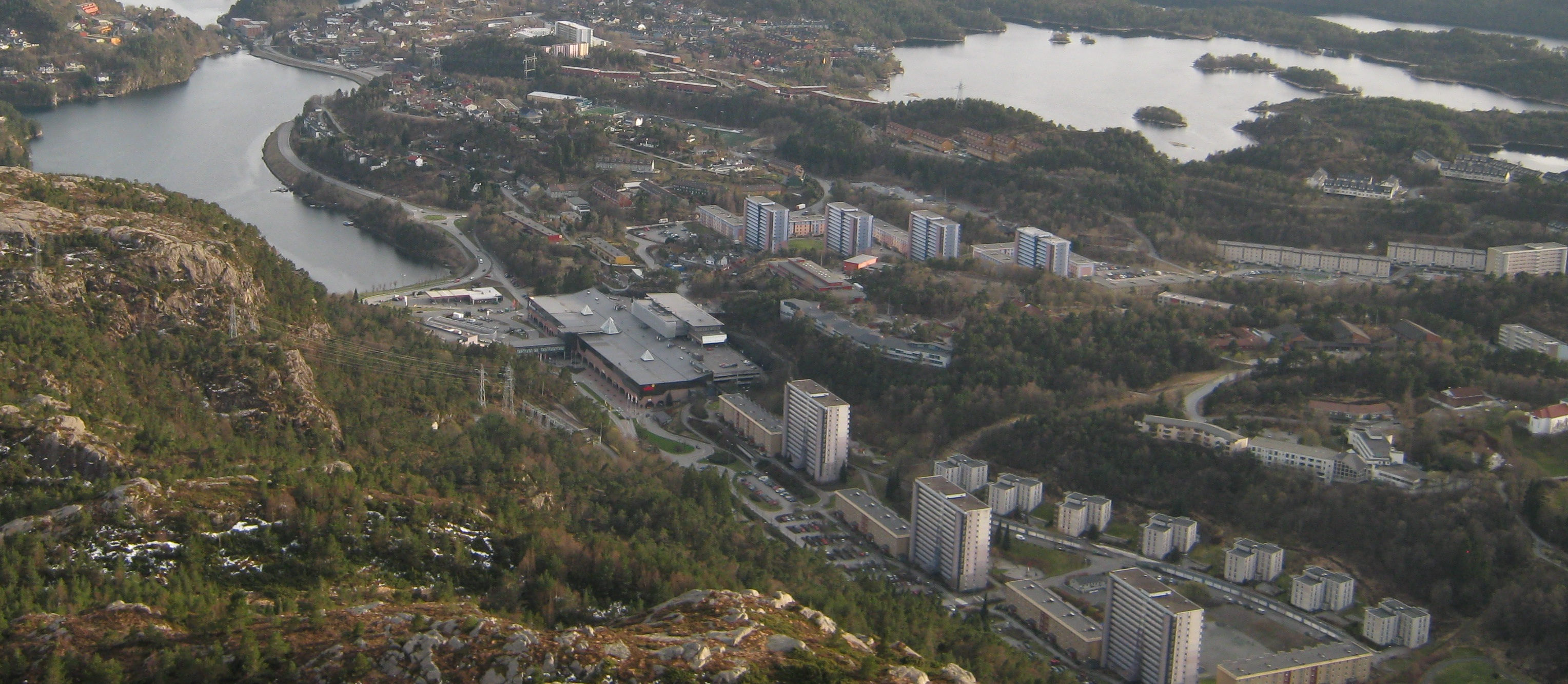 Sentrale deler av Loddefjord bydel med kjøpesenteret Vestkanten midt i bildet. I bakgrunnen skimtes Storavatnet.